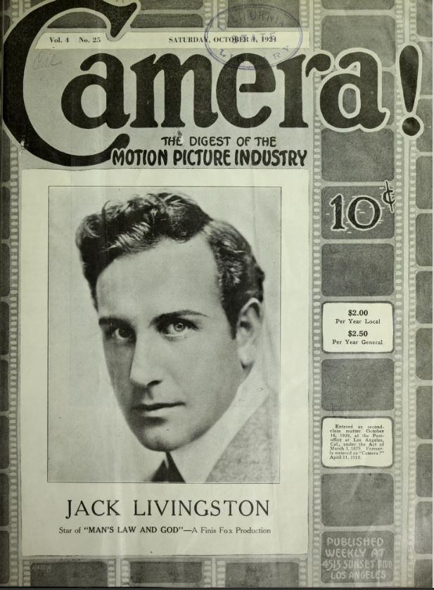 Jack Livingston